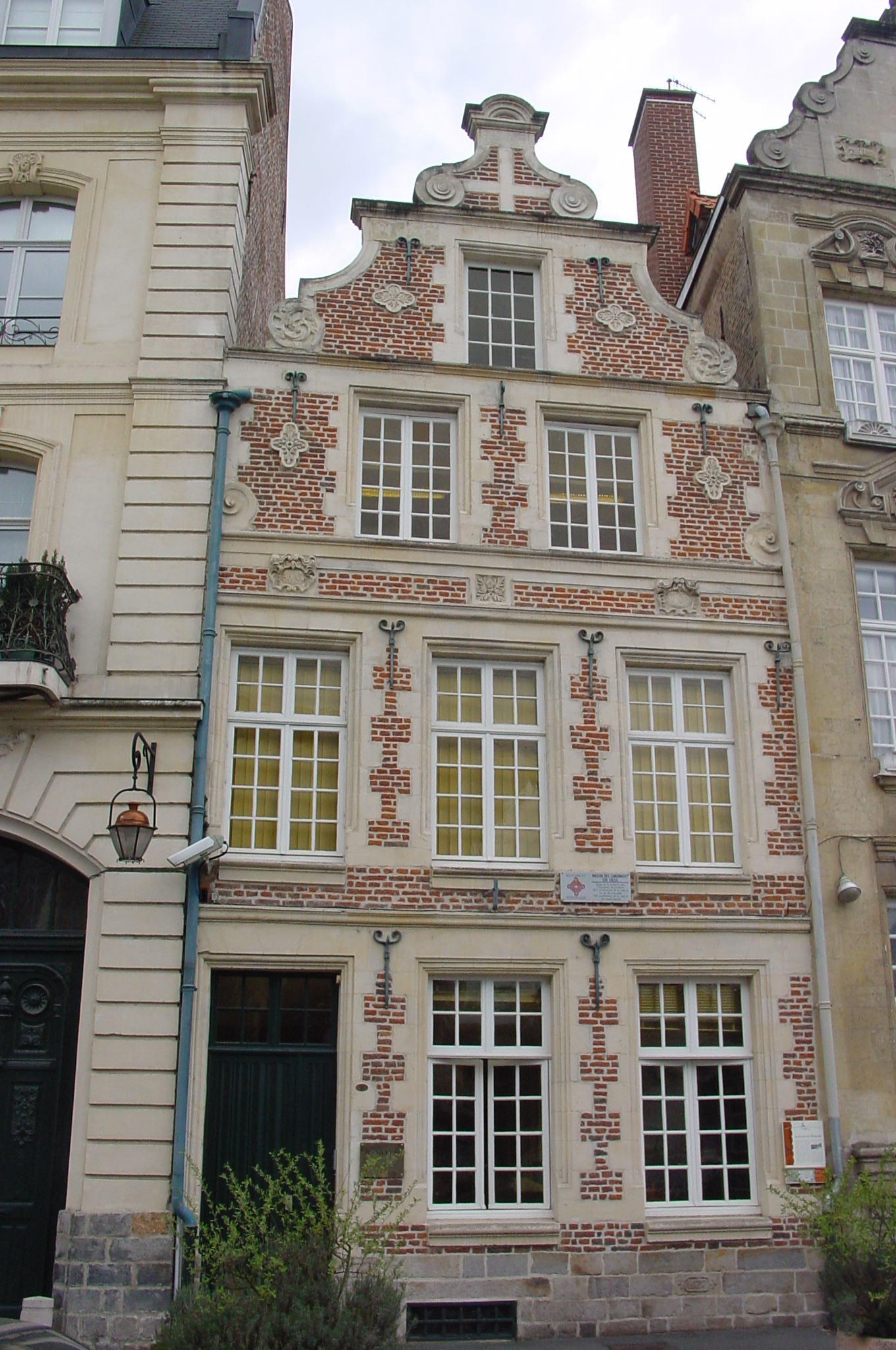 la "Maison des Canonniers" à Cambrai, exemple d'architecture flamande du 17e siècle